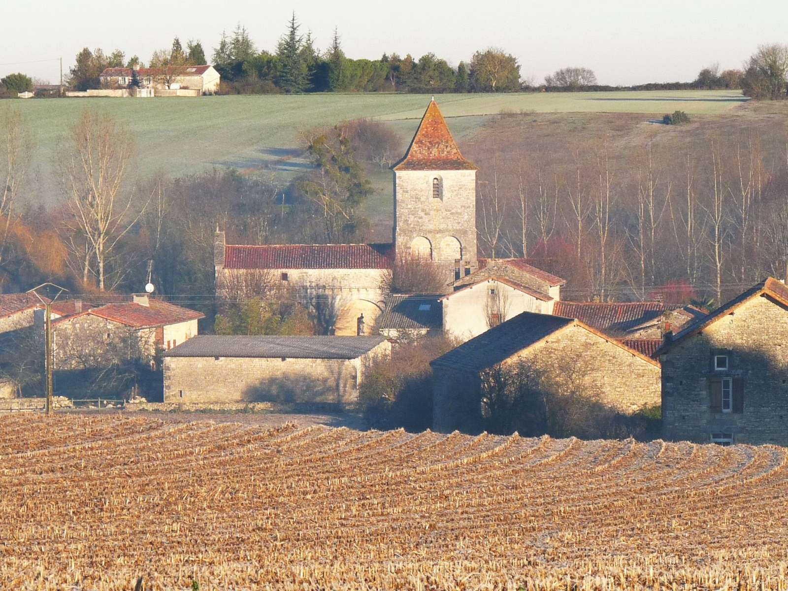 Mouton, vue de la route de St-Ciers, Charente, France